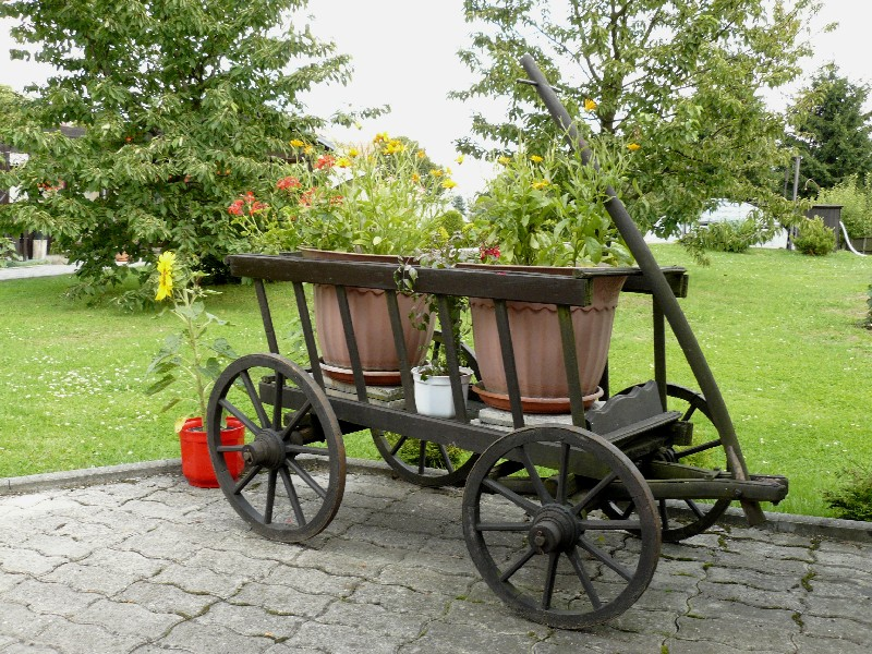 Ruční vozík žebřiňáček, používaný převážně v padesátých letech